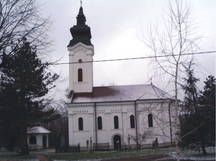 Црква у Радљеву.